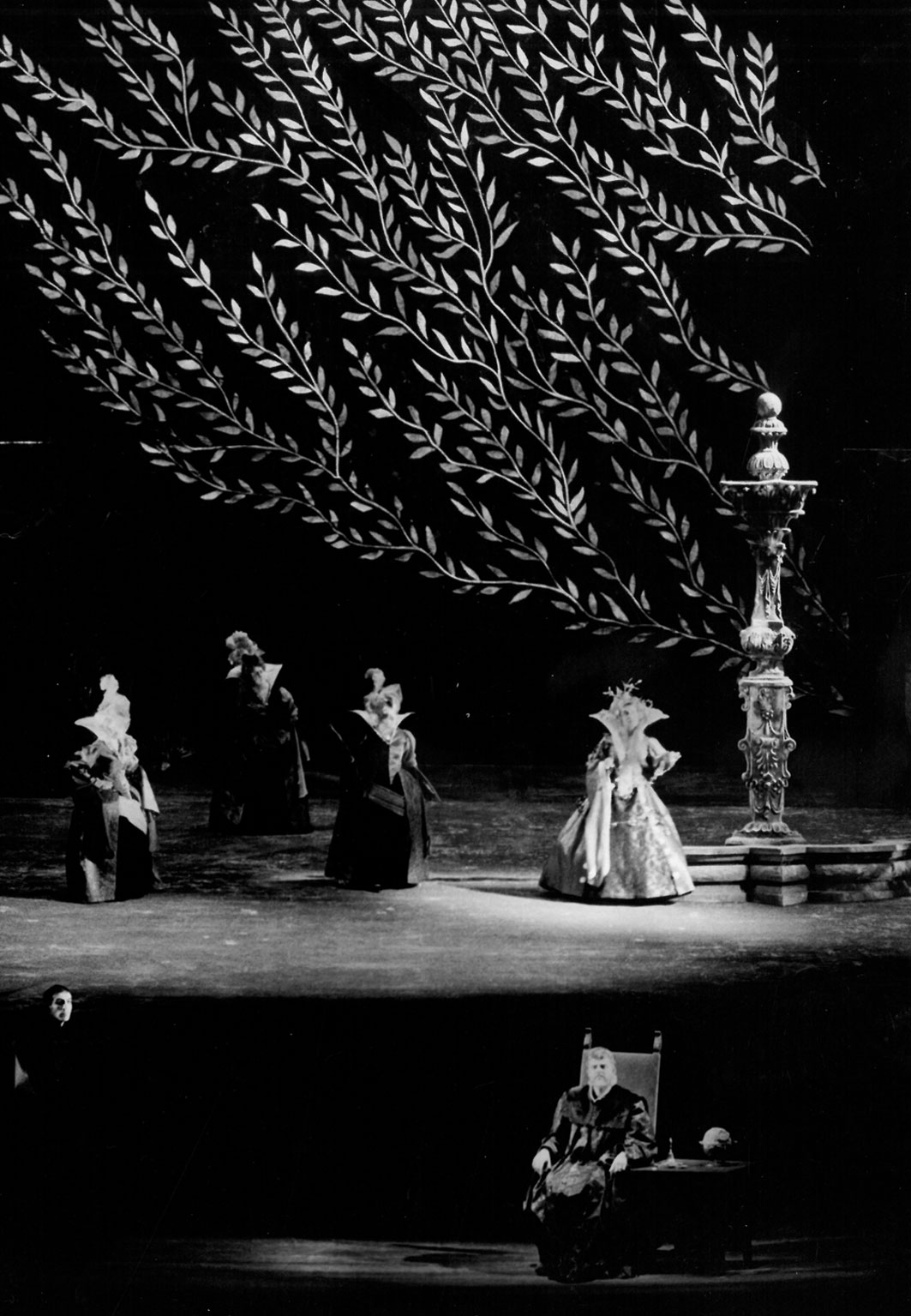 "Karl V." an der Bayerischen Staatsoper in der Inszenierung von Hans Hartleb, Dirigent: Reinhard Peters, Karl: Kieth Engen, Eleonore: Annelies Waas (Foto: Rudolf Betz)